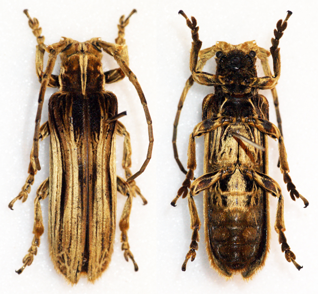 Wiedemann,1819 Sex: ? Data: 06-2013 - Samar - Eastern Vizcaya - Philippines Size: ?